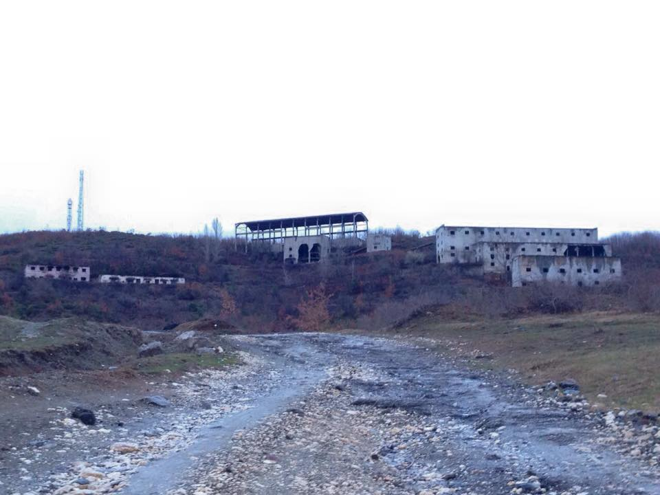 Fabrika ne fshatin Golaj1